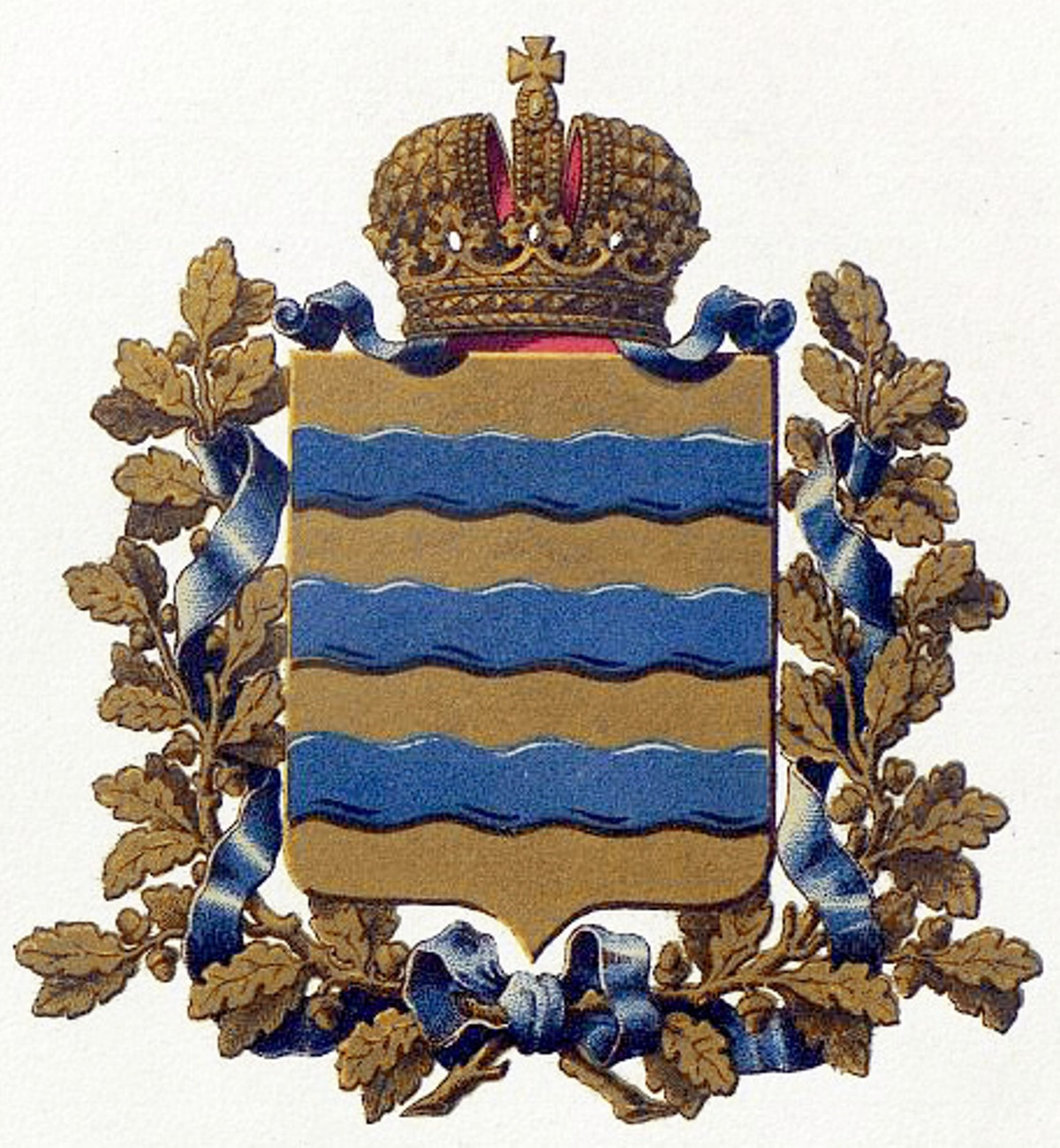 Official Russian Empire coat of arms Minsk Governorate. Герб Российской Империи Минской губернии в Гербовнике МВД. Утверждён Императором Всероссийским Александром Вторым.